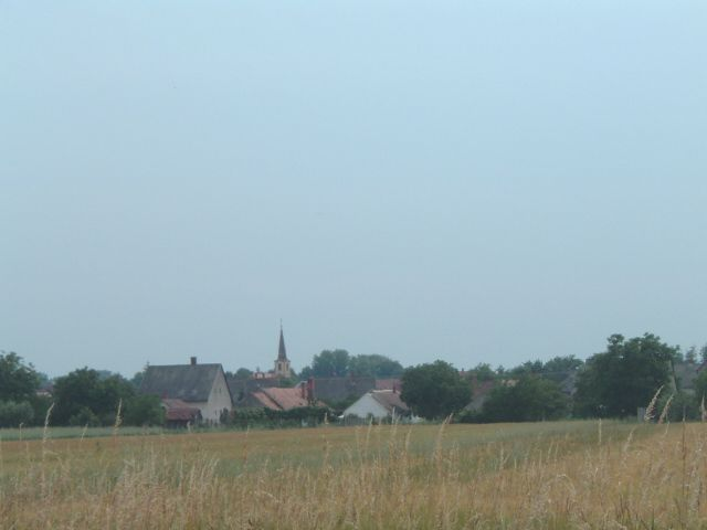 Vasasszonyfa, Hungary